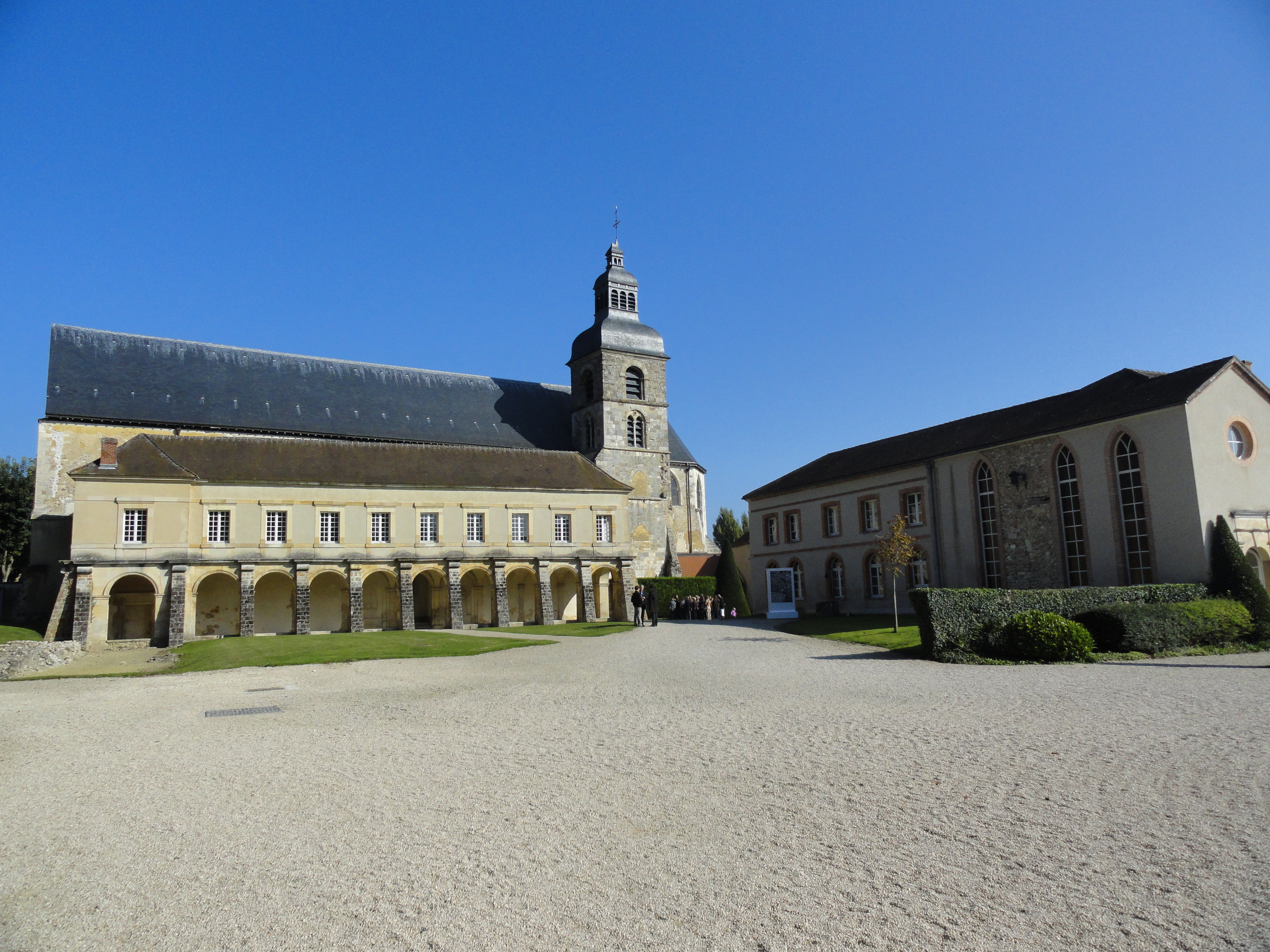 Vue d'ensemble des bâtiments actuels de l'ancienne abbaye d'Hautvillers.